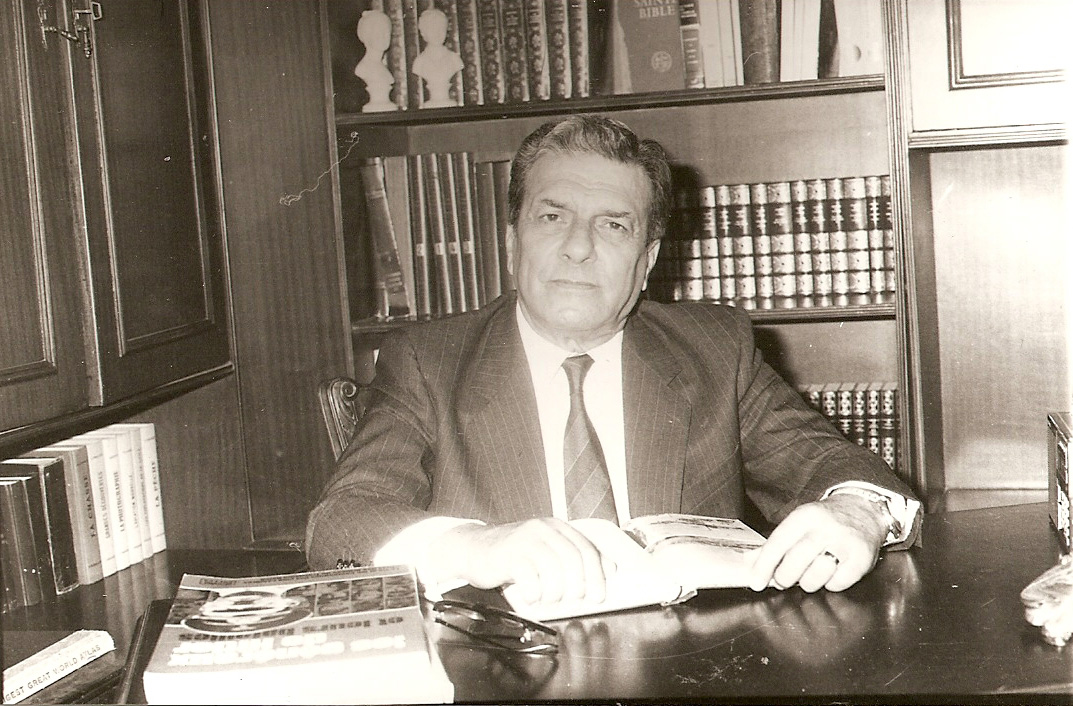 Cheikh Farid Hamadé Patriote Druze Libanais